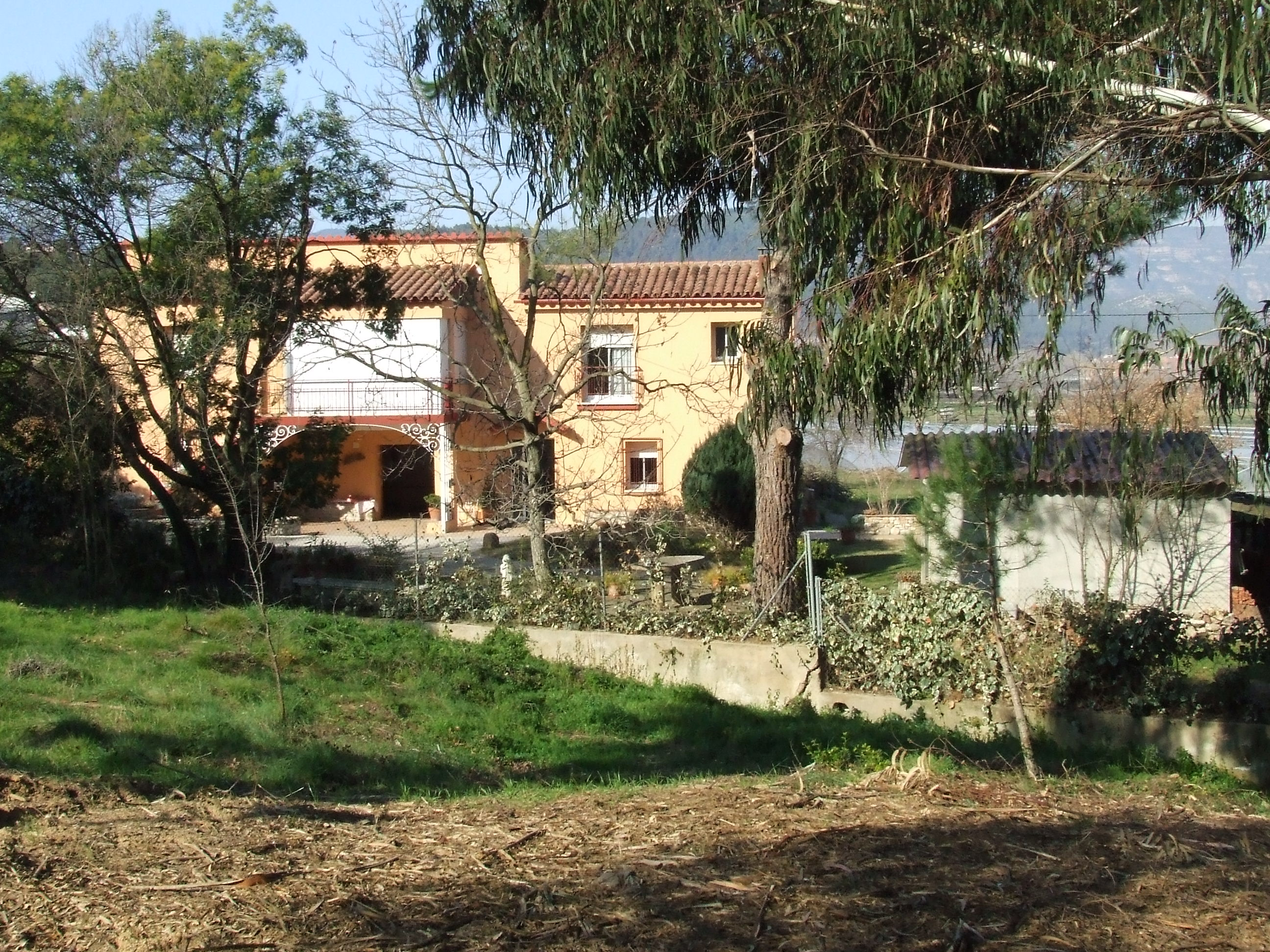 El Molí Sec (Bigues, Bigues i Riells, Vallès Oriental)